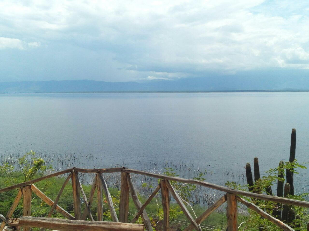 Mirado Lago Enriquillo en Bahoruco (República Dominicana)